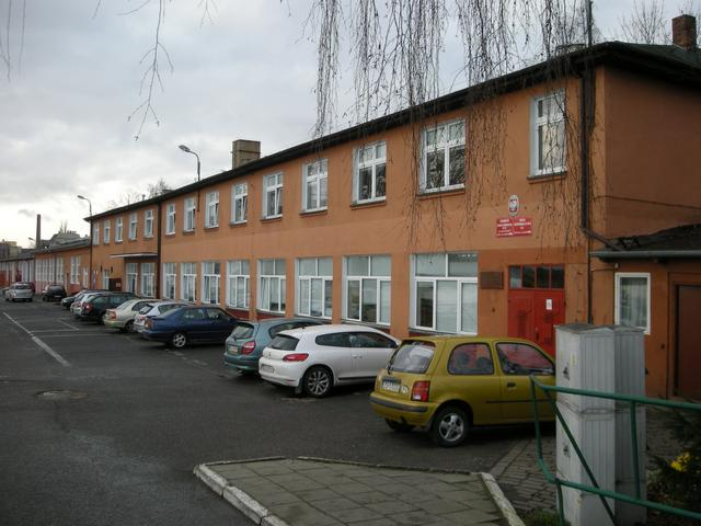 Budynek Zasadniczej Szkoły Zawodowej nr 16 im. Jana Pawła II oraz Szkoły Przysposabiającej do Pracy nr 3 w Szczecinie przy ul. Kolumba 88A na Wyspie Jaskółczej.